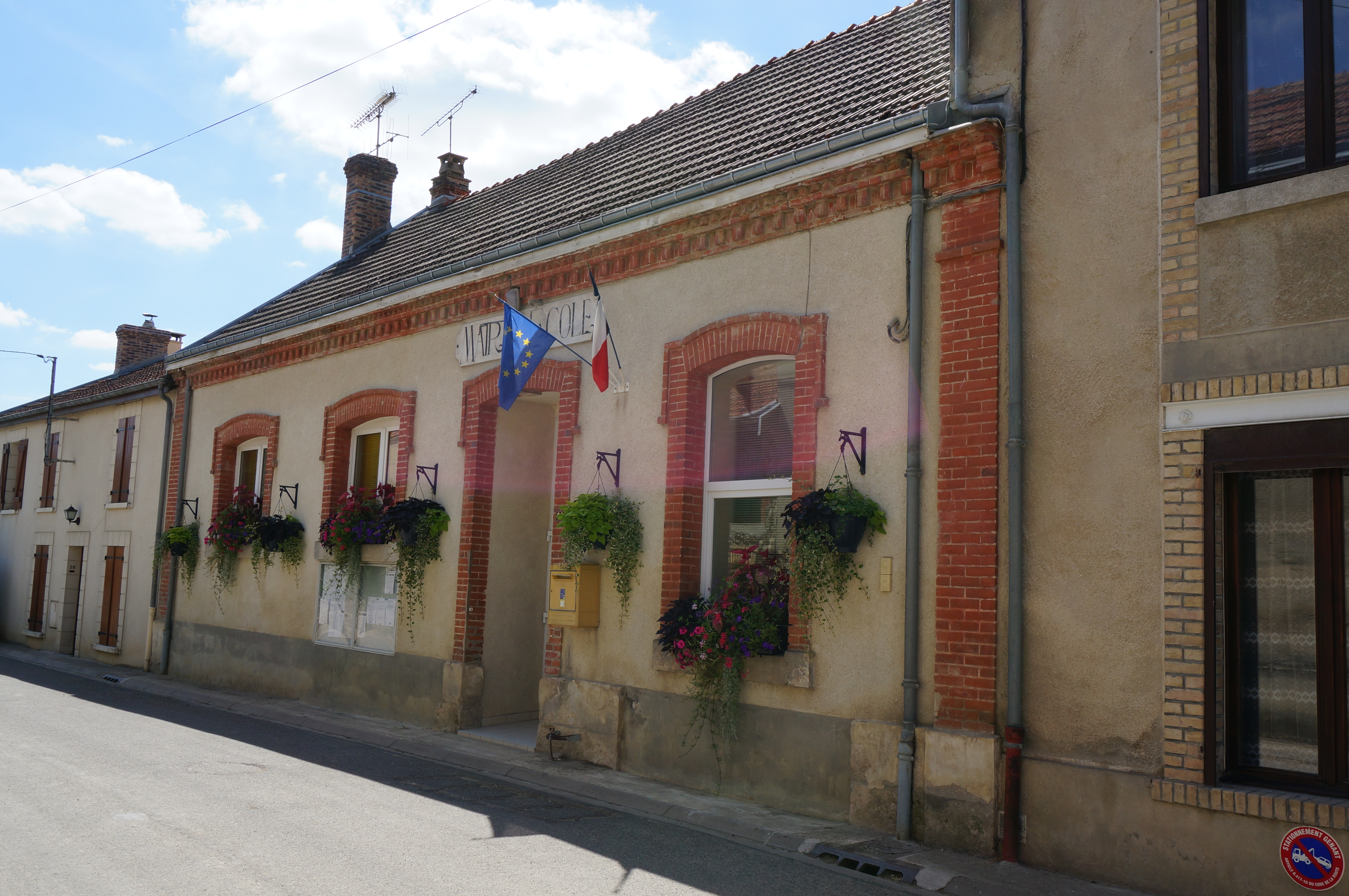 Vue de la Mairie .